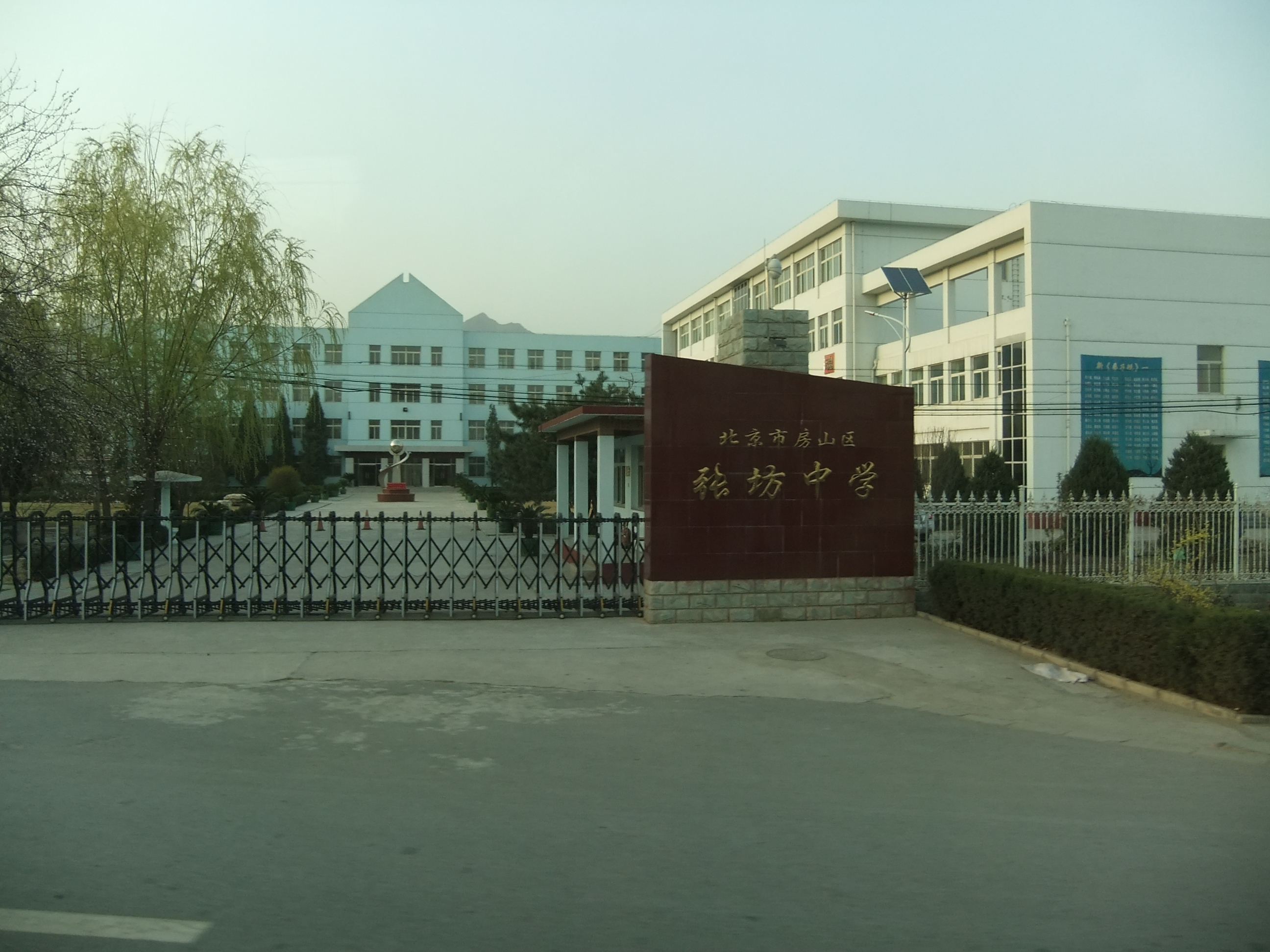 张坊中学 - Zhangfang Middle School - 2011.04